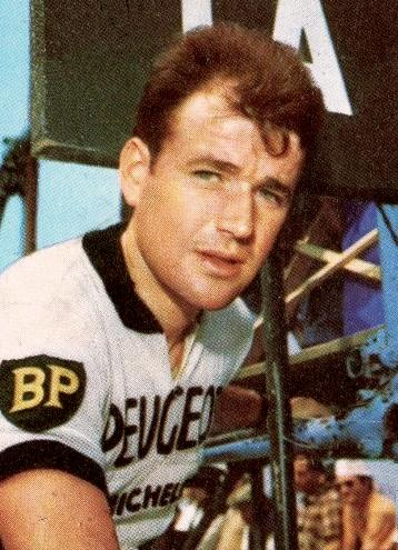 Raymond Delisle (1971), 'Sprint 71', Panini figurina n°82.